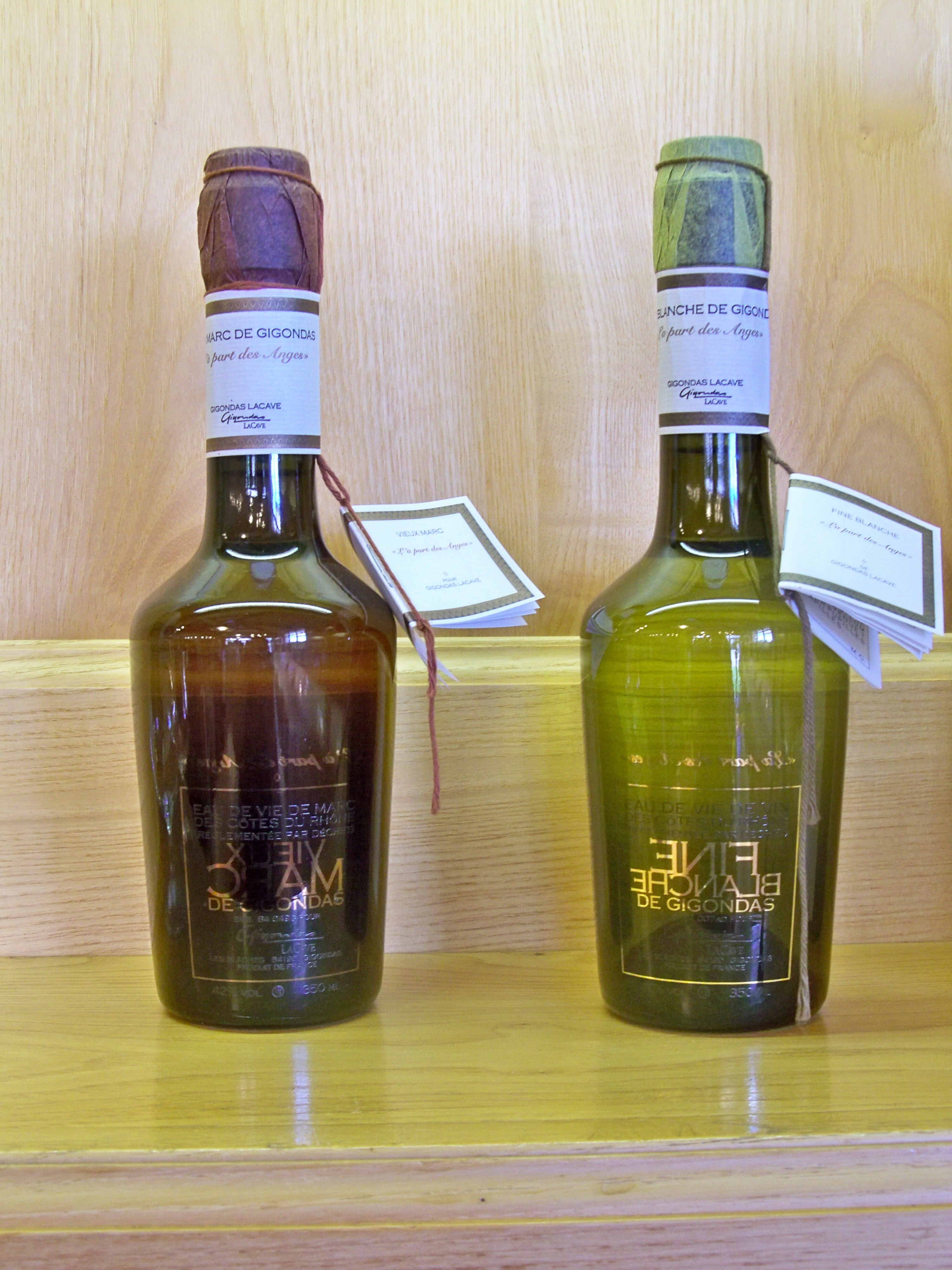 bouteilles de Marc et fine Gigondas